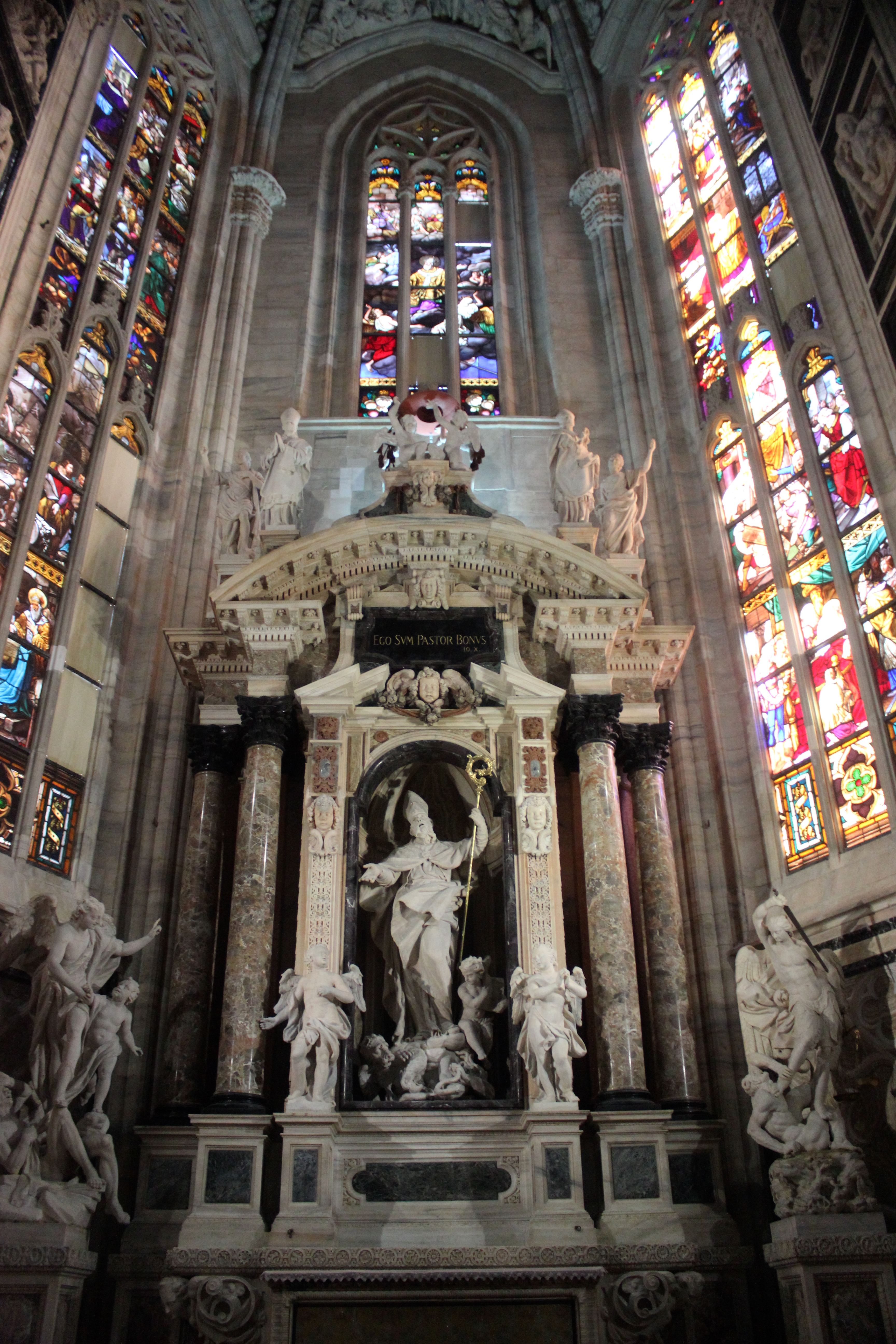 Duomo de Milán. Transepto derecho.